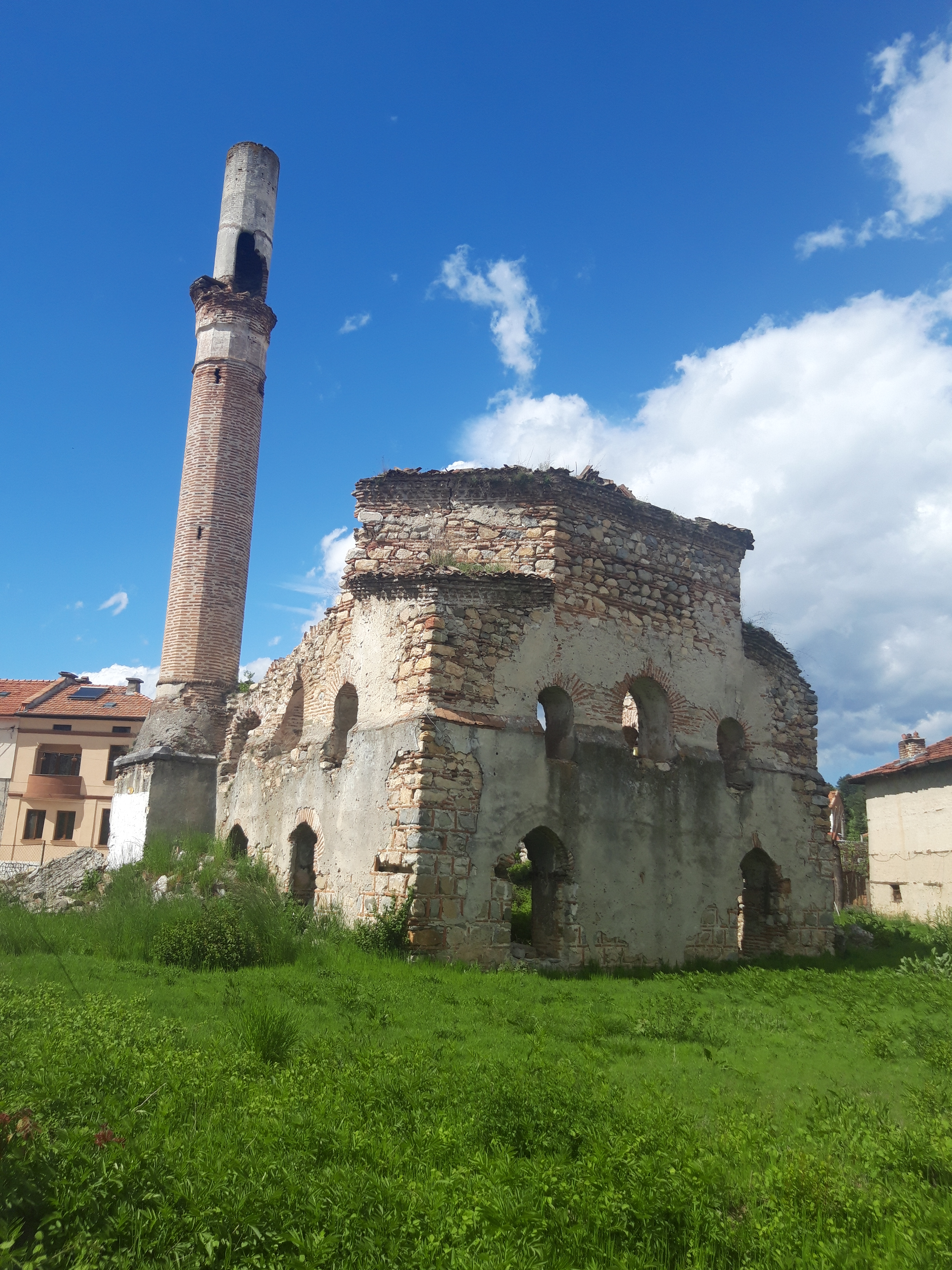 Караджа Паша джамия в Гоце Делчев. Състояние през април 2019 г.